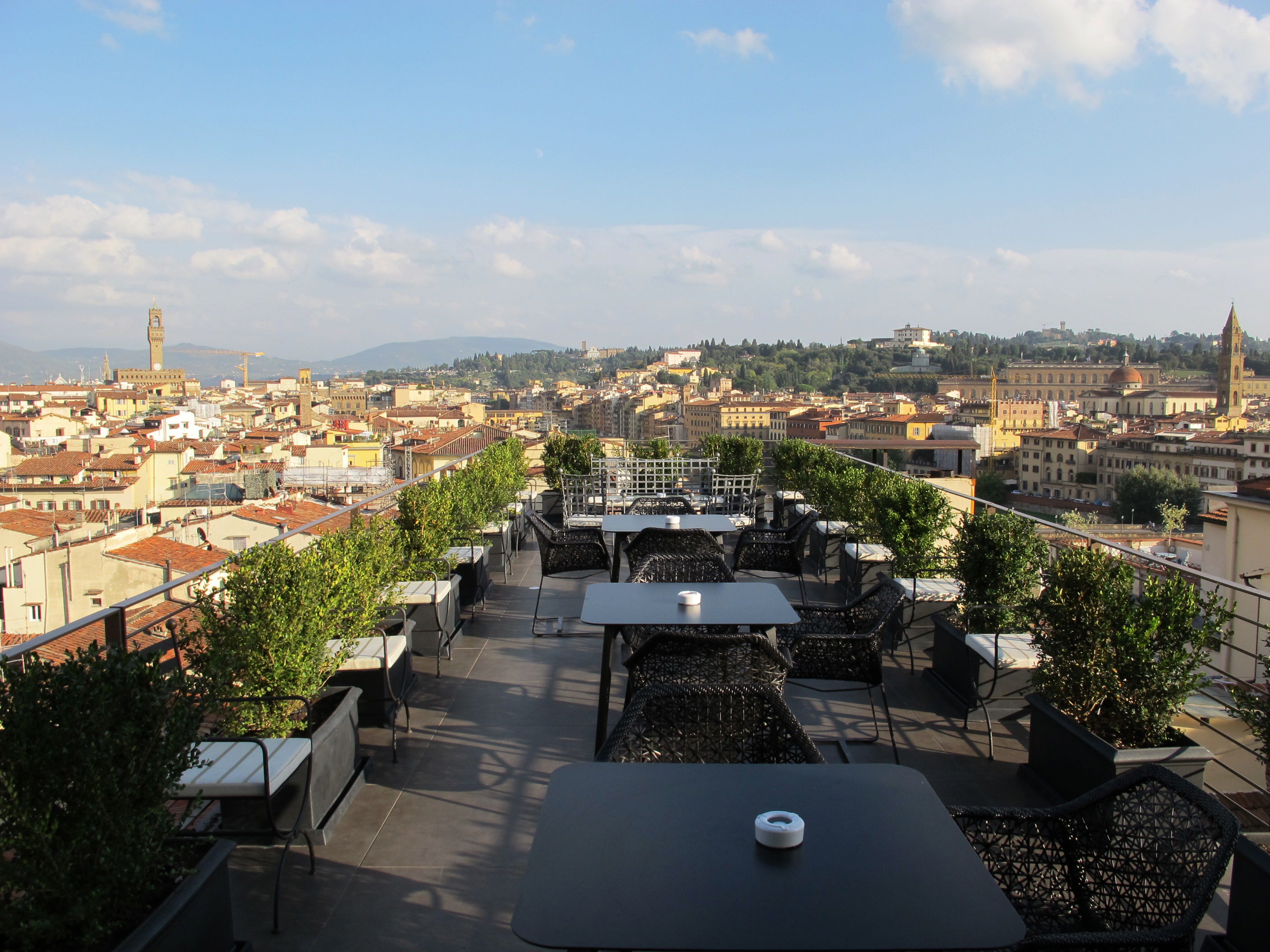 Hotel excelsior, terrazza, vista